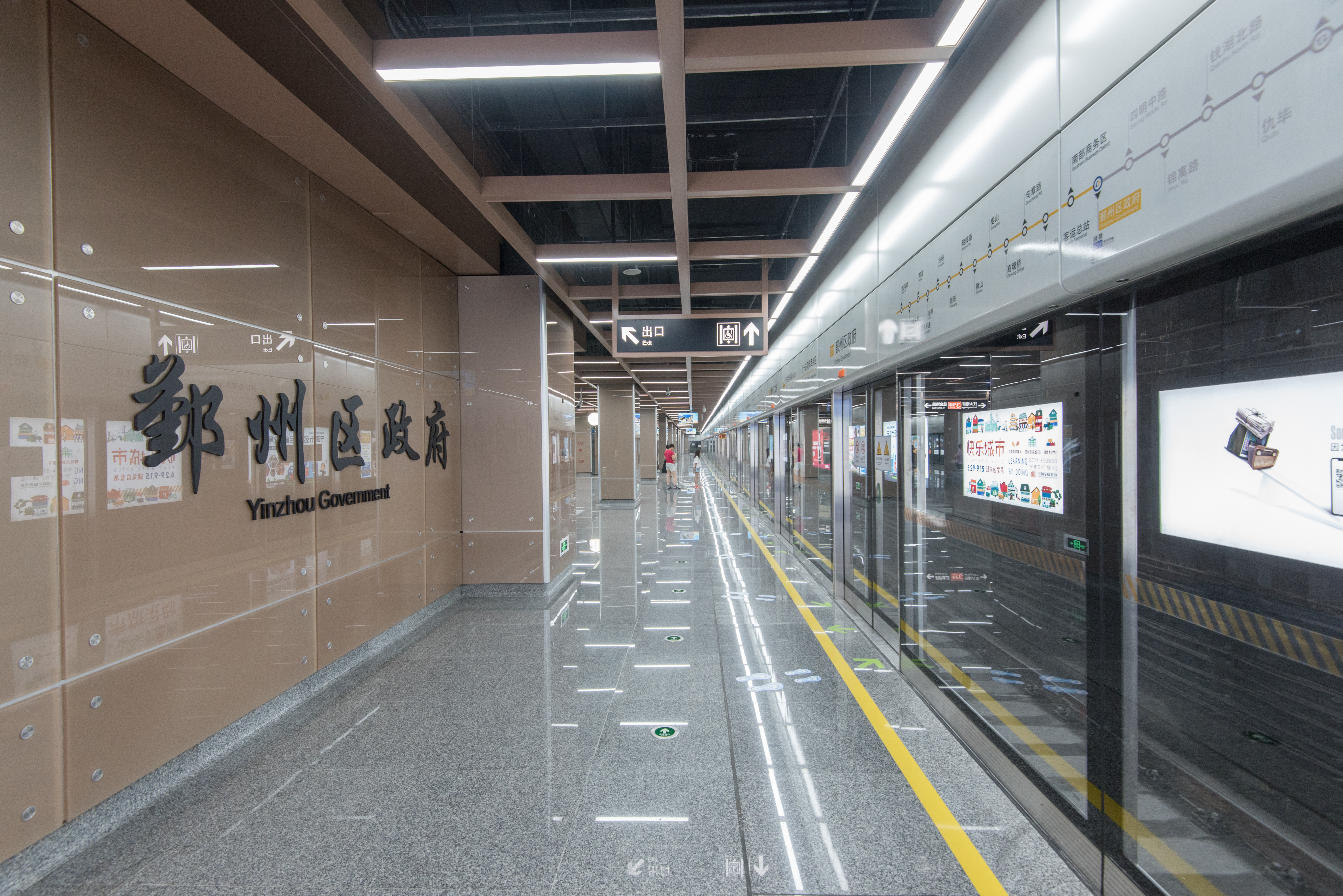 宁波地铁鄞州区政府站